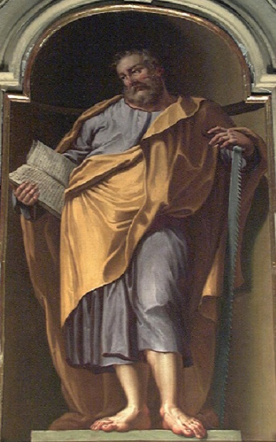 Simone (Apostolo), olio su tela, cm. 200 x 100, Chiesa di San Giovanni Vincenzo in Sant'Ambrogio di Torino (Diocesi di Susa), Piemonte